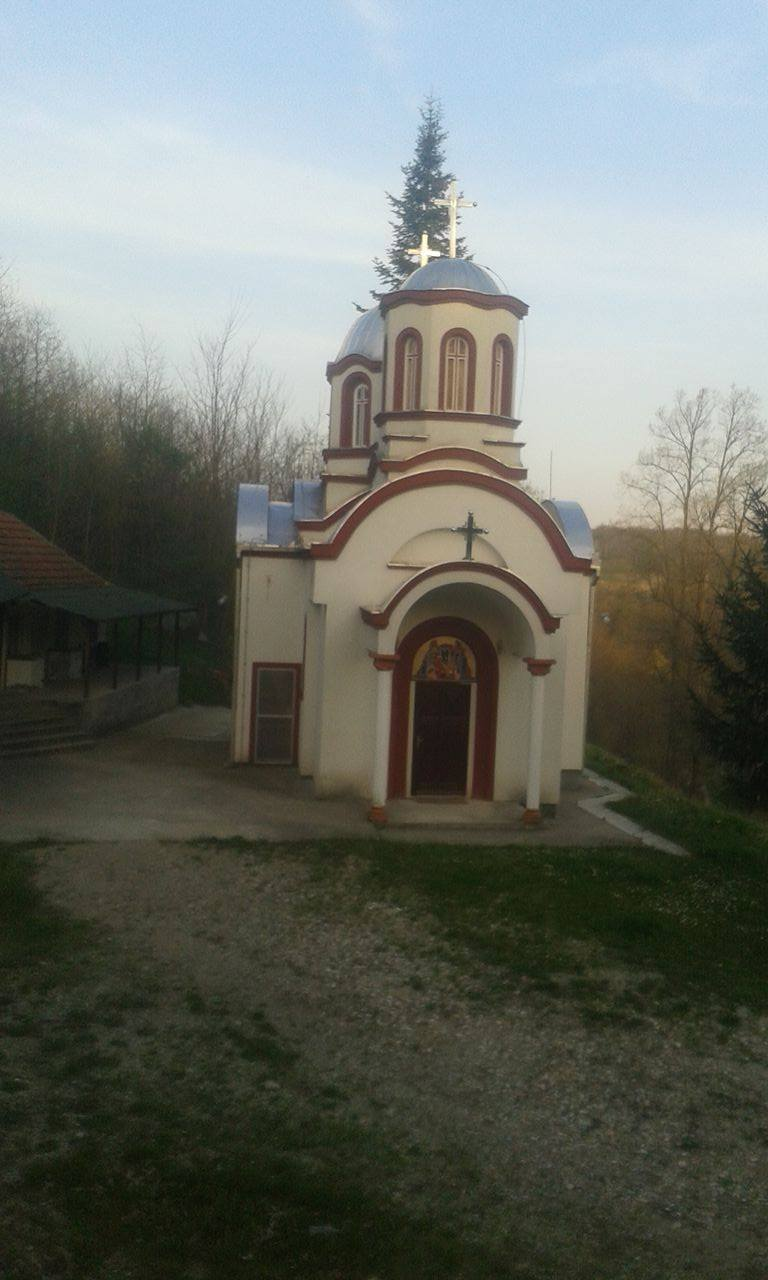 Црква у Јаковљу